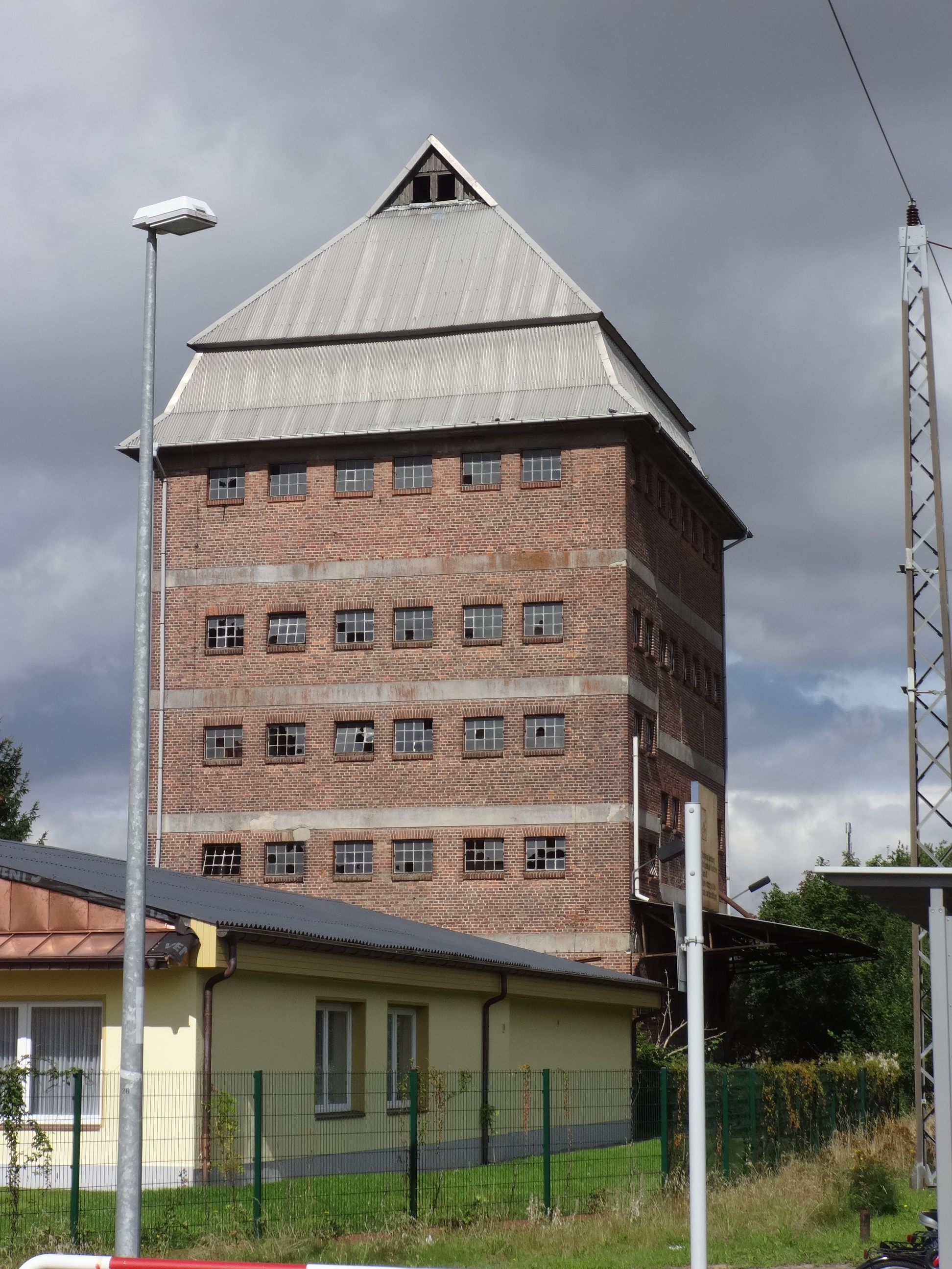 Denkmalgeschützte Gebäude in Miltzow, ein Ortsteil der Gemeinde Sundhagen in Mecklenburg-Vorpommern